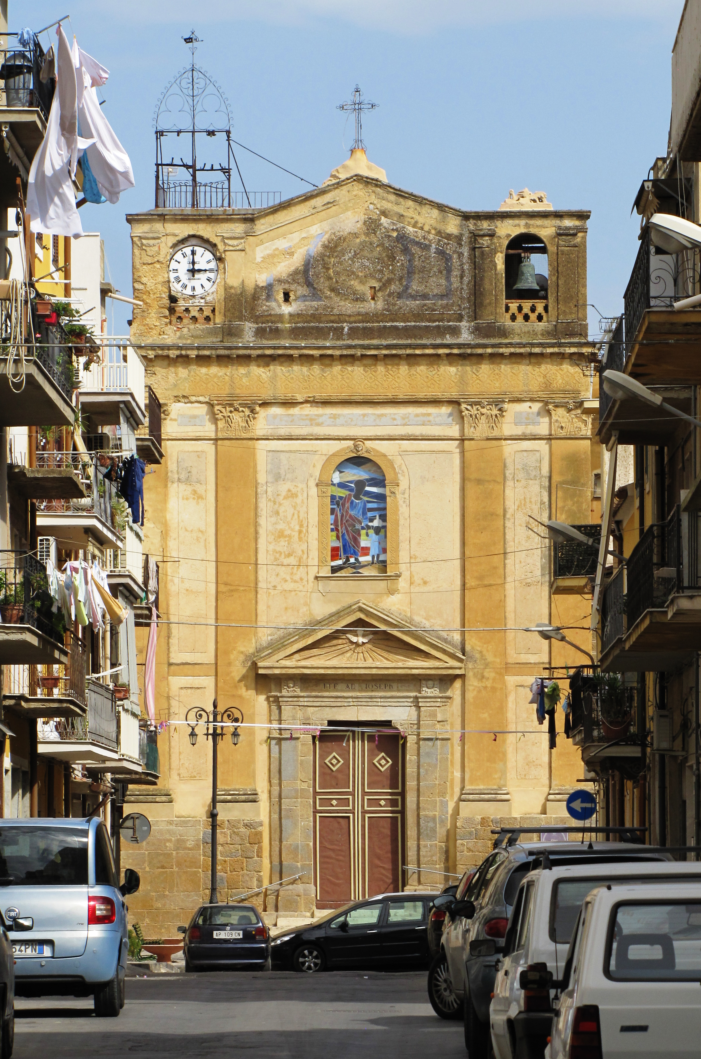 Chiesa di San Giuseppe This is a photo of a monument which is part of cultural heritage of Italy.